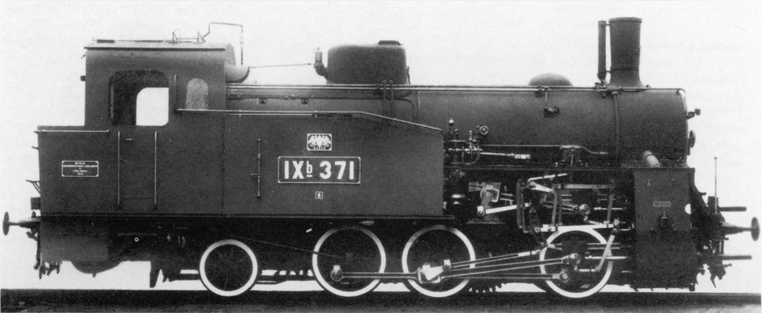 Dampflokomotive Badische IX b.